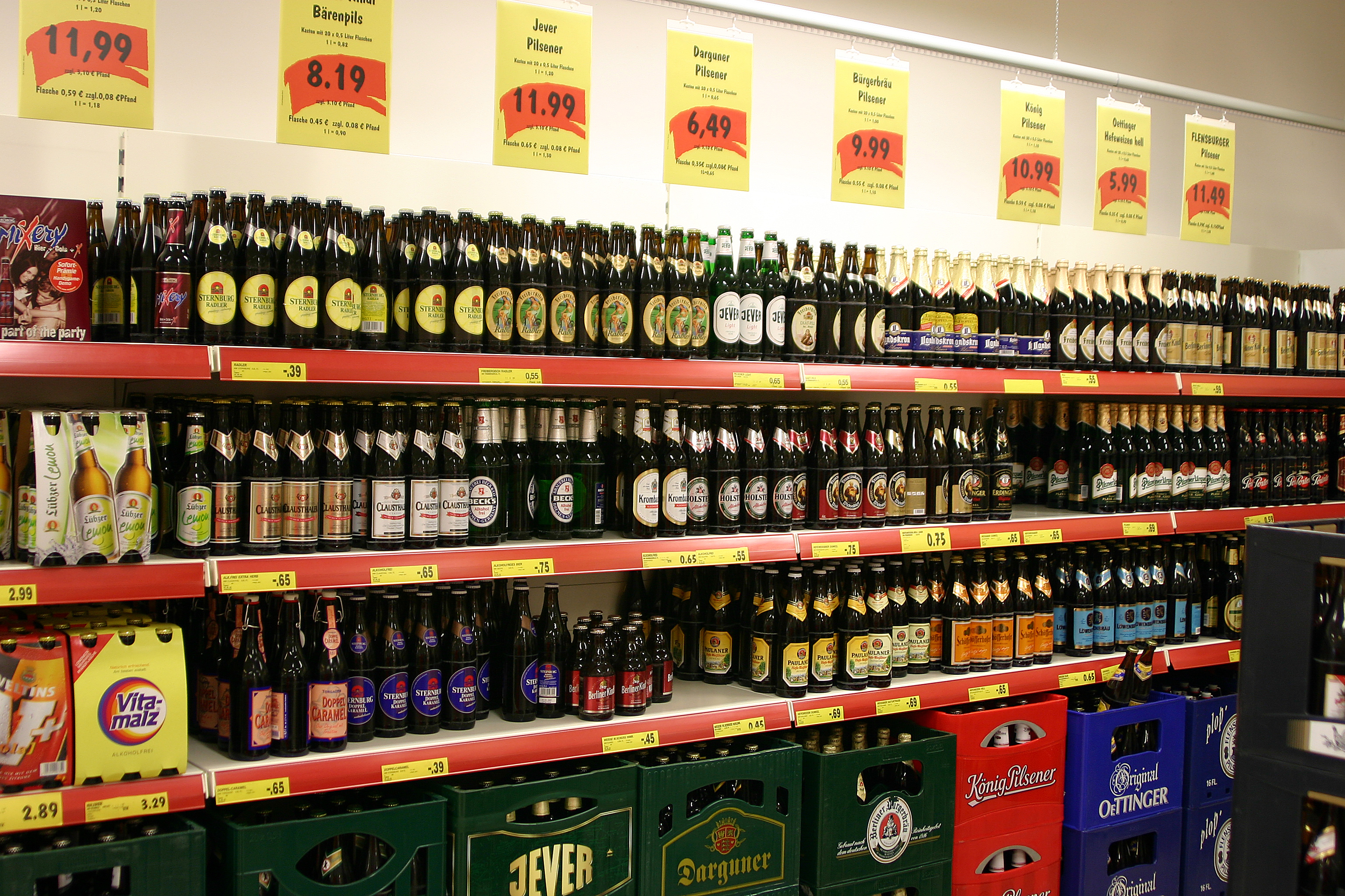 Bilder im Supermarkt REWE